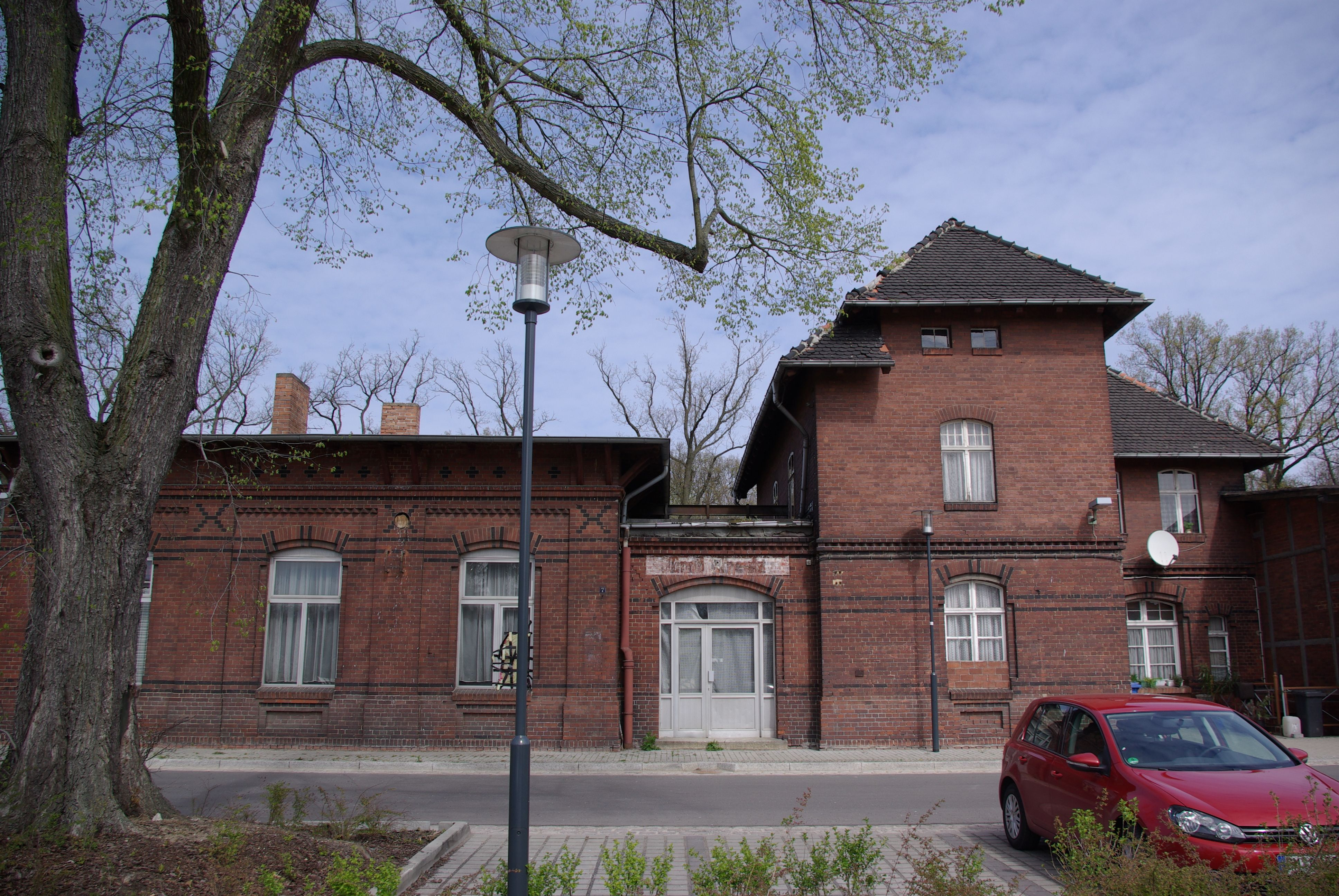 Groß Kreutz in Brandenburg. Der Bahnhof mit Nebengebäuden steht unter Denkmalschutz.